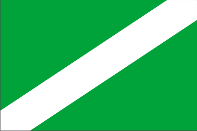 Bandera de La Guancha, en Santa Cruz de Tenerife (España)